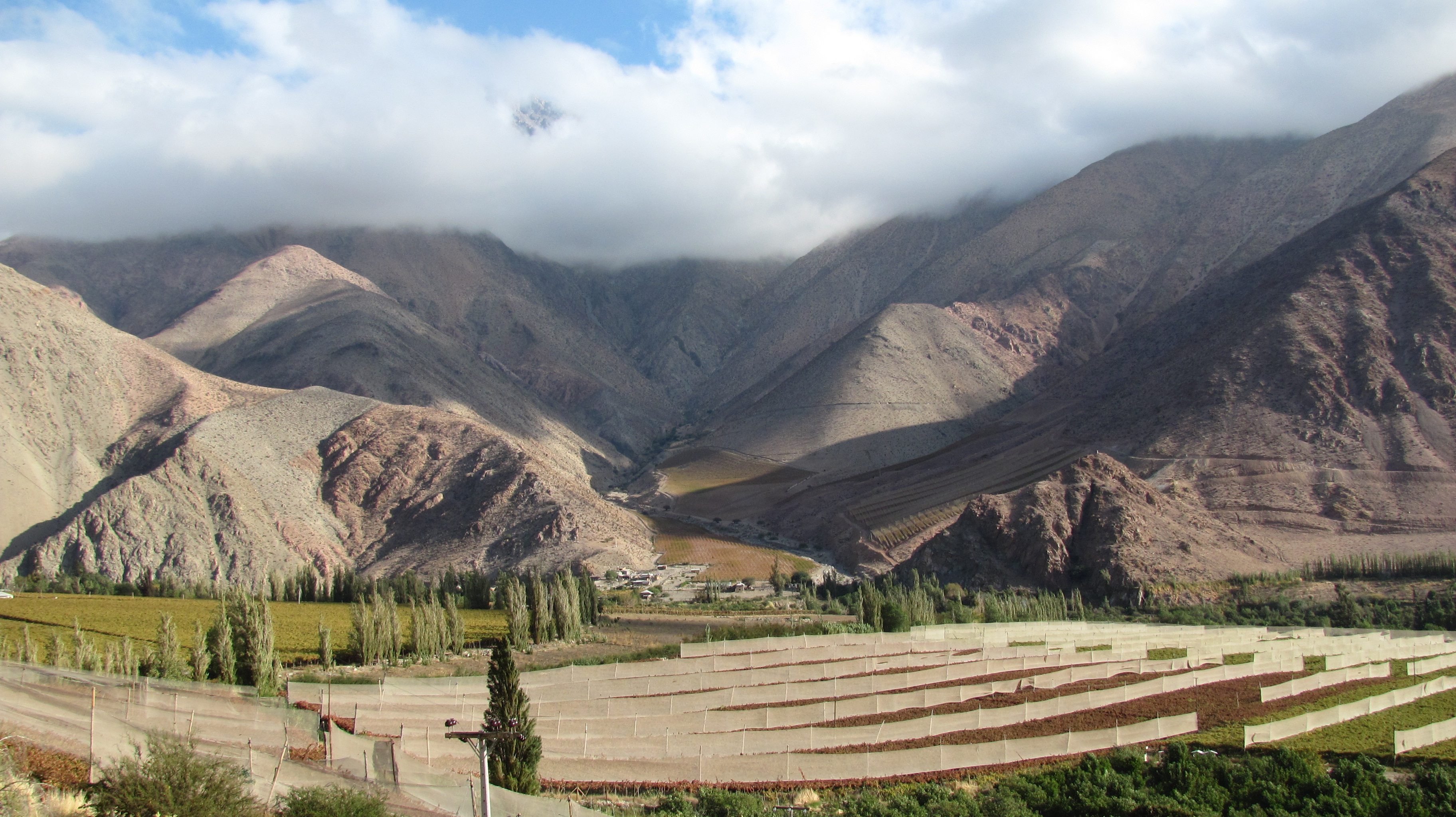 Terrazas en el Valle del Elqui.